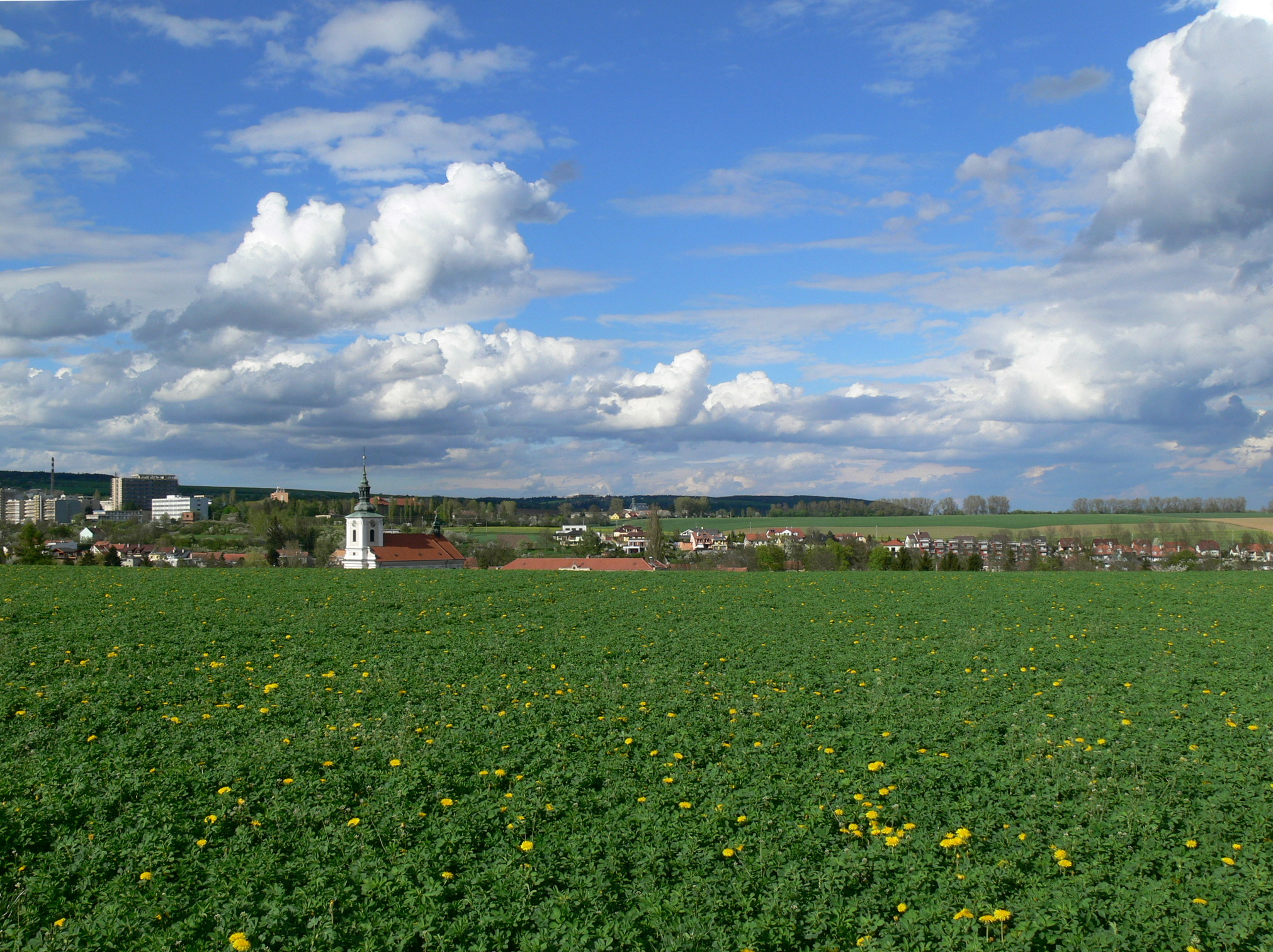 Dědice, Víta Nejedlého, kostel, A. B. Svojsíka